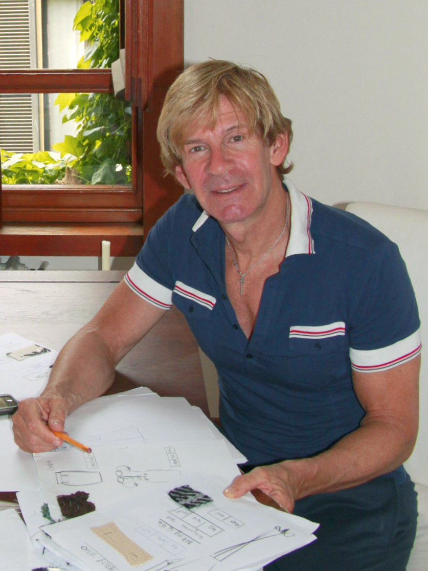 Addy van den Krommenacker 2009